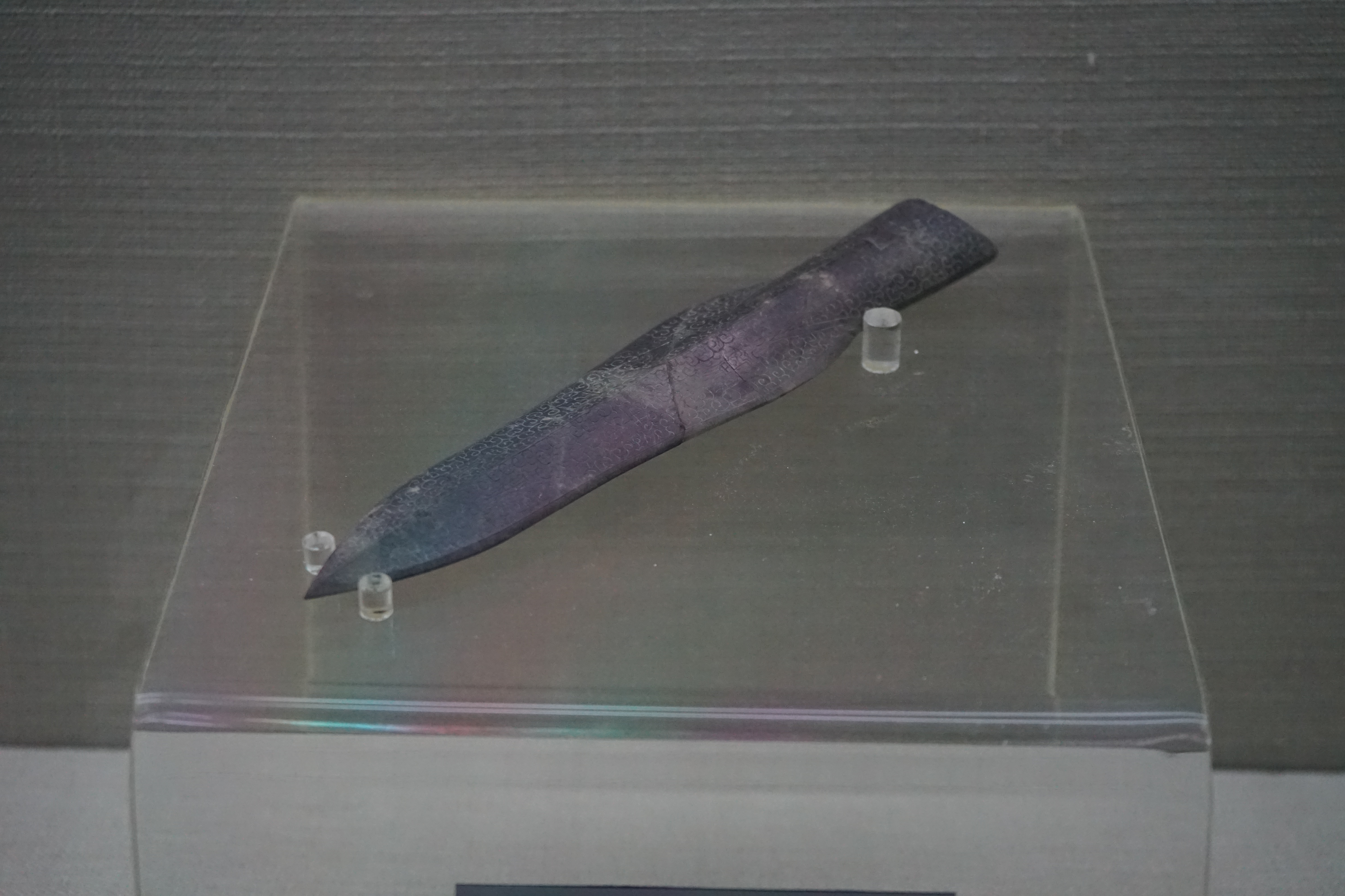 越王不光矛 战国 绍兴上蒋凤凰山木椁墓出土